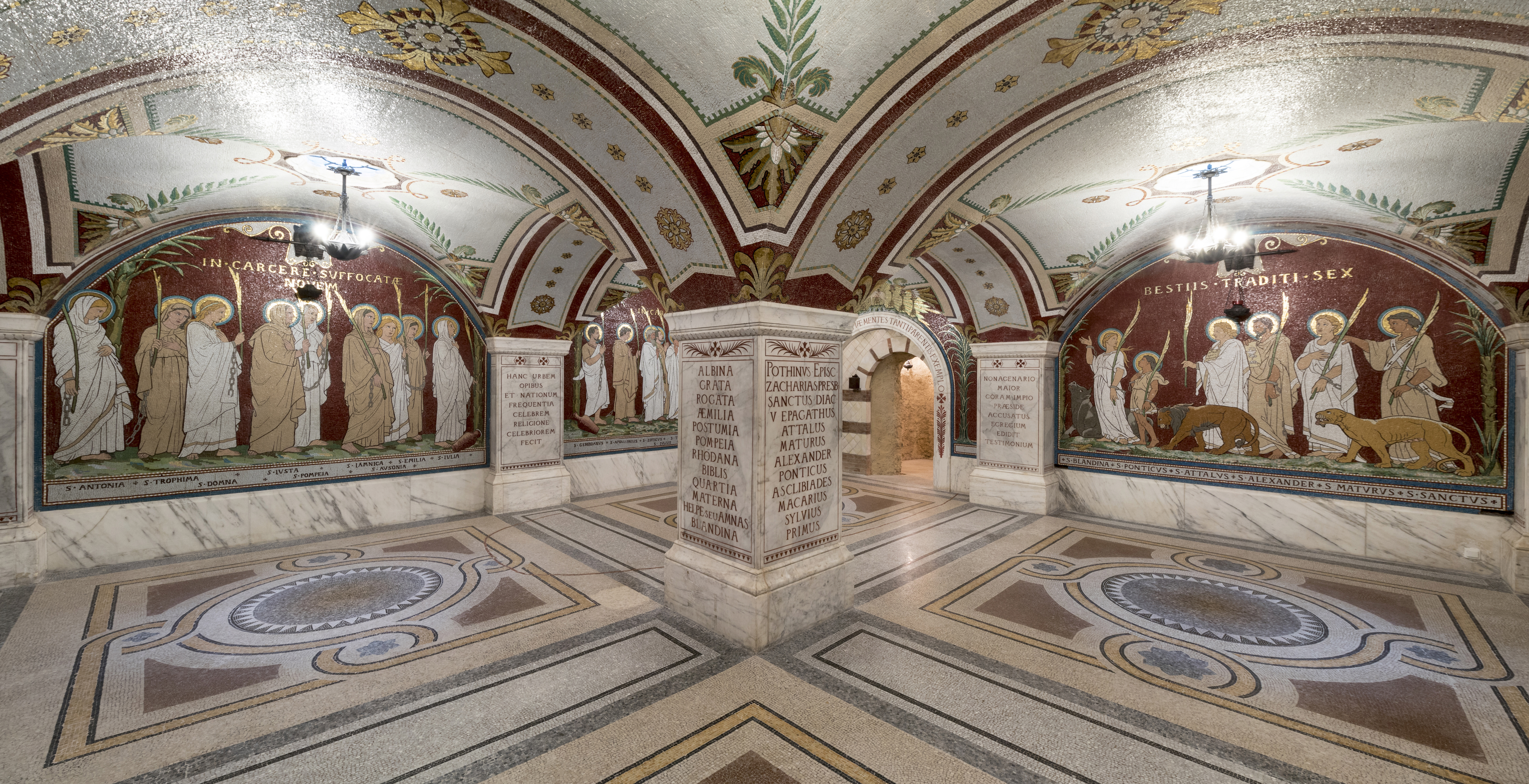 La crypte des martyrs a été réalisée à la fin du XIXème siècle.